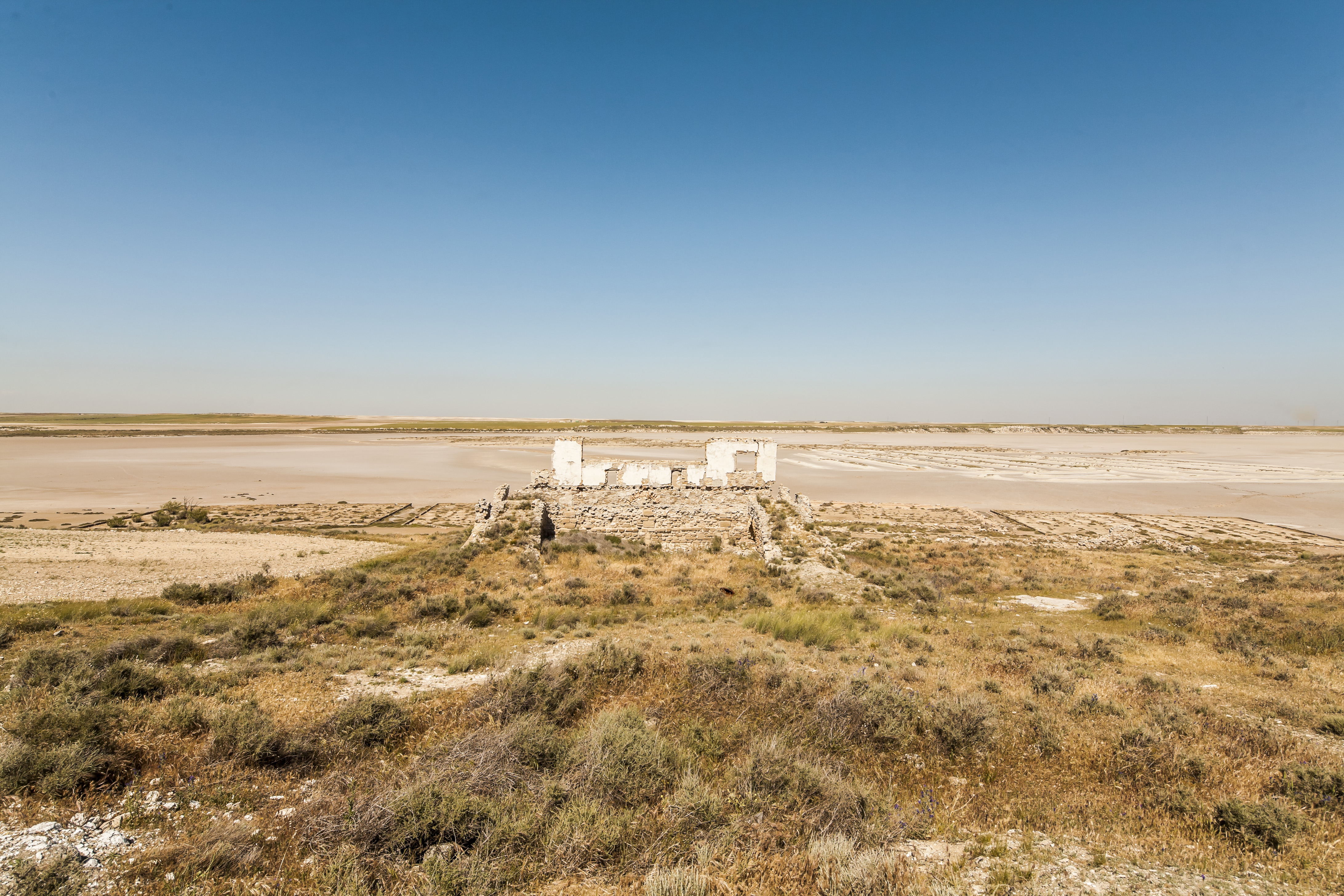 Laguna de la Playa, en Sástago This is a photography of a Site of Community Importance in Spain with the ID: ES2430082. Natura2000 entry, EEA entry